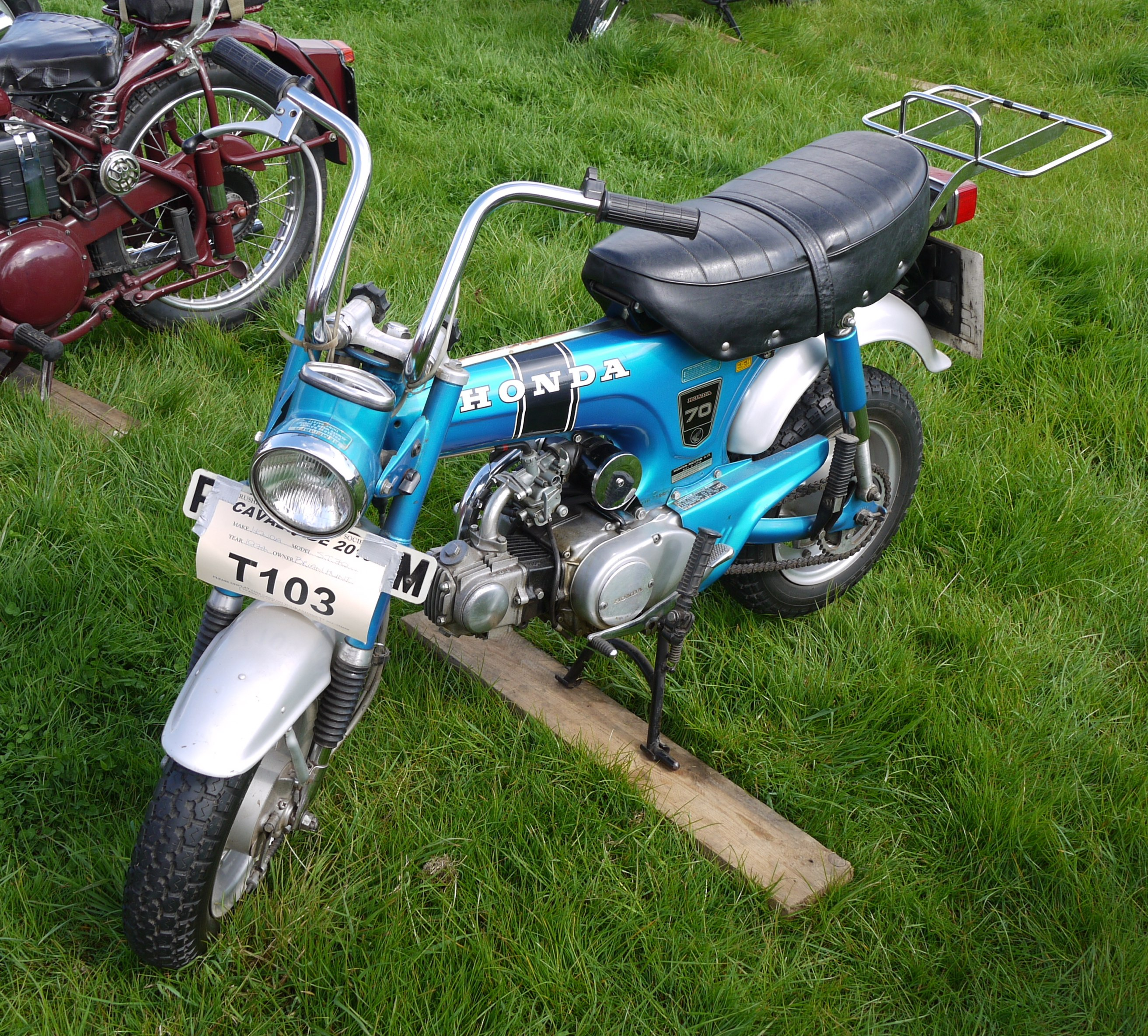 Panasonic G1 14-45 Lens